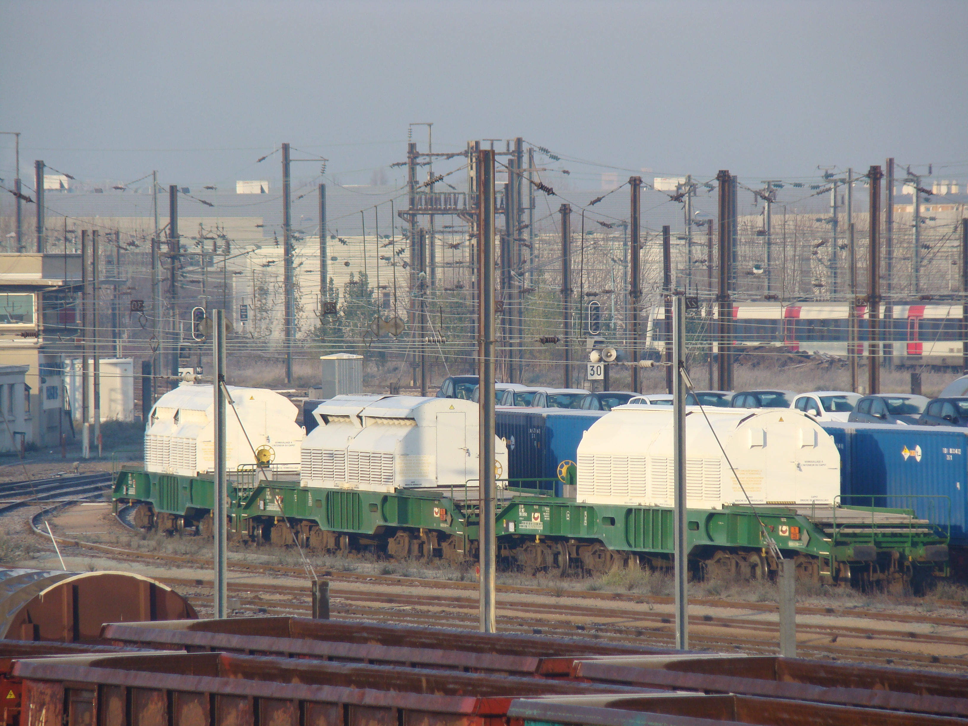 Pris le 12/12/12 sur le convoi entre les Pays Bas et La Hague et qui contient 6,7 tonnes de combustible nucléaire usagé (principalement de l'uranium)